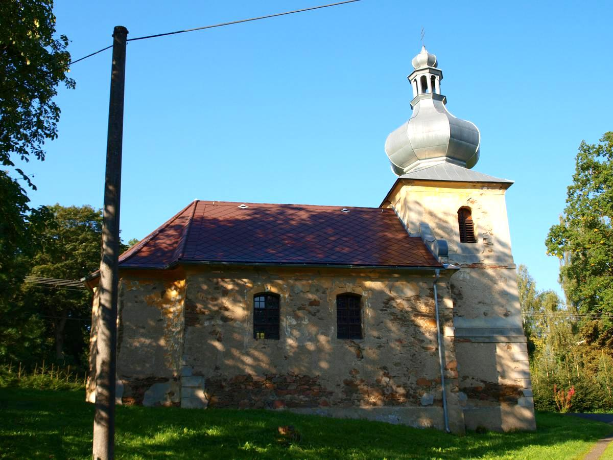 Svinov, okres Karlovy Vary